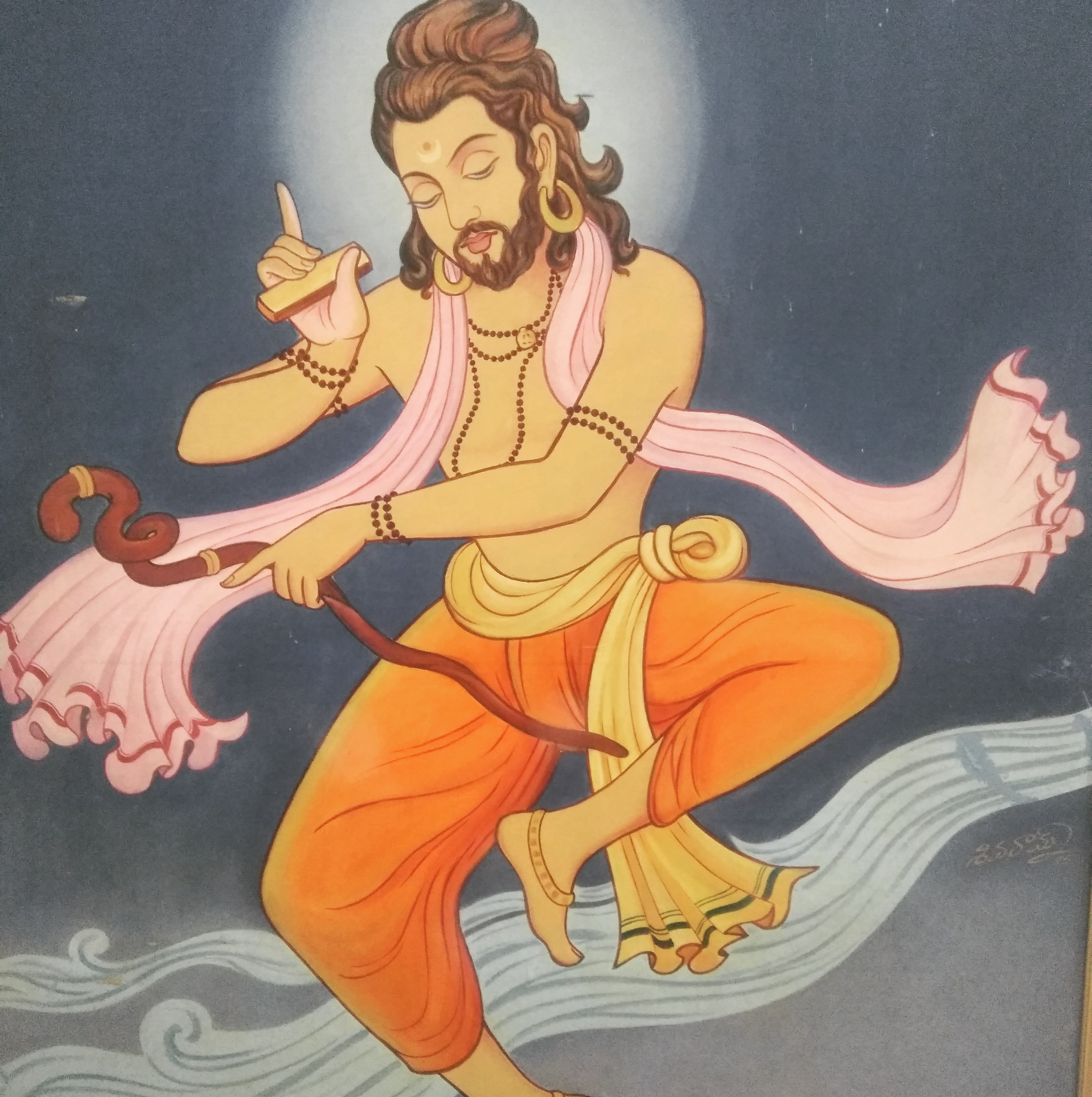 Sidhendra Yogi: Acquired knowledge of various in sanskrit at Varanasi.He bacame saint Sidhendra came to Kuchipudi wrote Bhamakalapam and taught it to the Kuchipudi dancers. సిద్దేంద్ర యెూగి: కాశీలో సకల శాస్త్రాలు చదివి సిద్దన్న ,సిధ్దేంద్ర యెూగియై కూచిపూడి భామాకలాపం రచించి కూచిపూడి నర్తకులకు నేర్పాడు. Artist:Goli Shivaram.